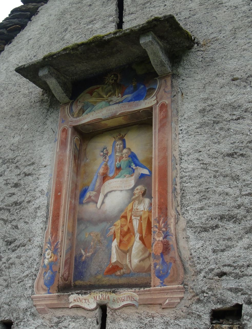 Maria, Aurigeno, Ticino